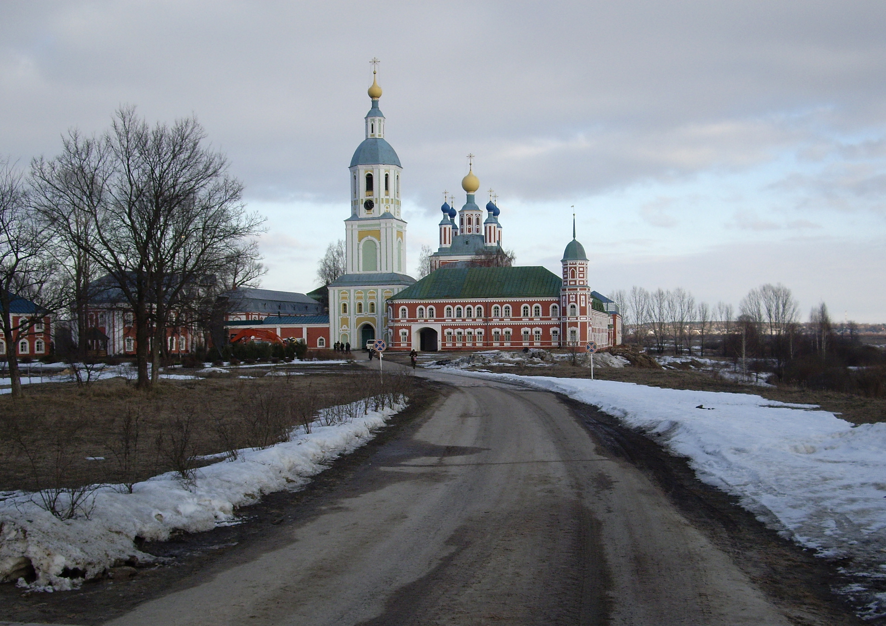 Рождество-Богородичный Санаксарский монастырь, Темников